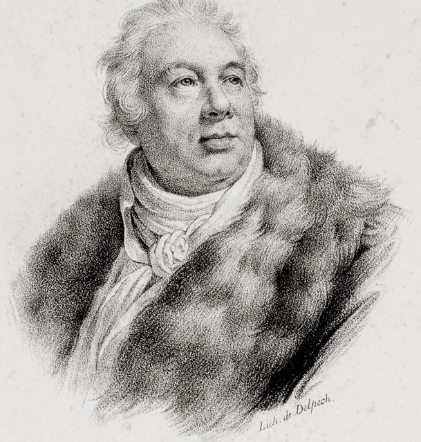 Portrait of Jean-François Ducis (1733-1816)